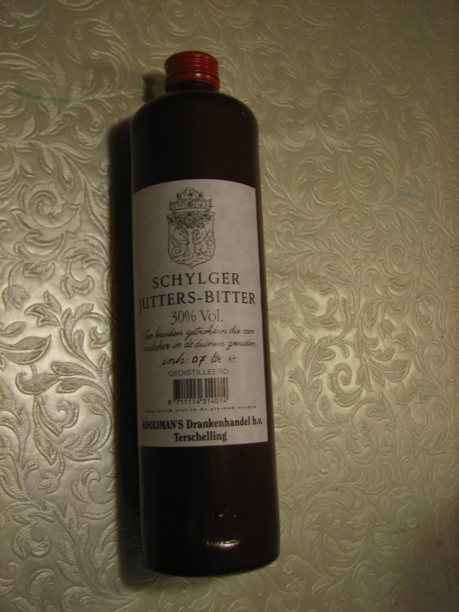 Tafeldoek met fles juttersbitter